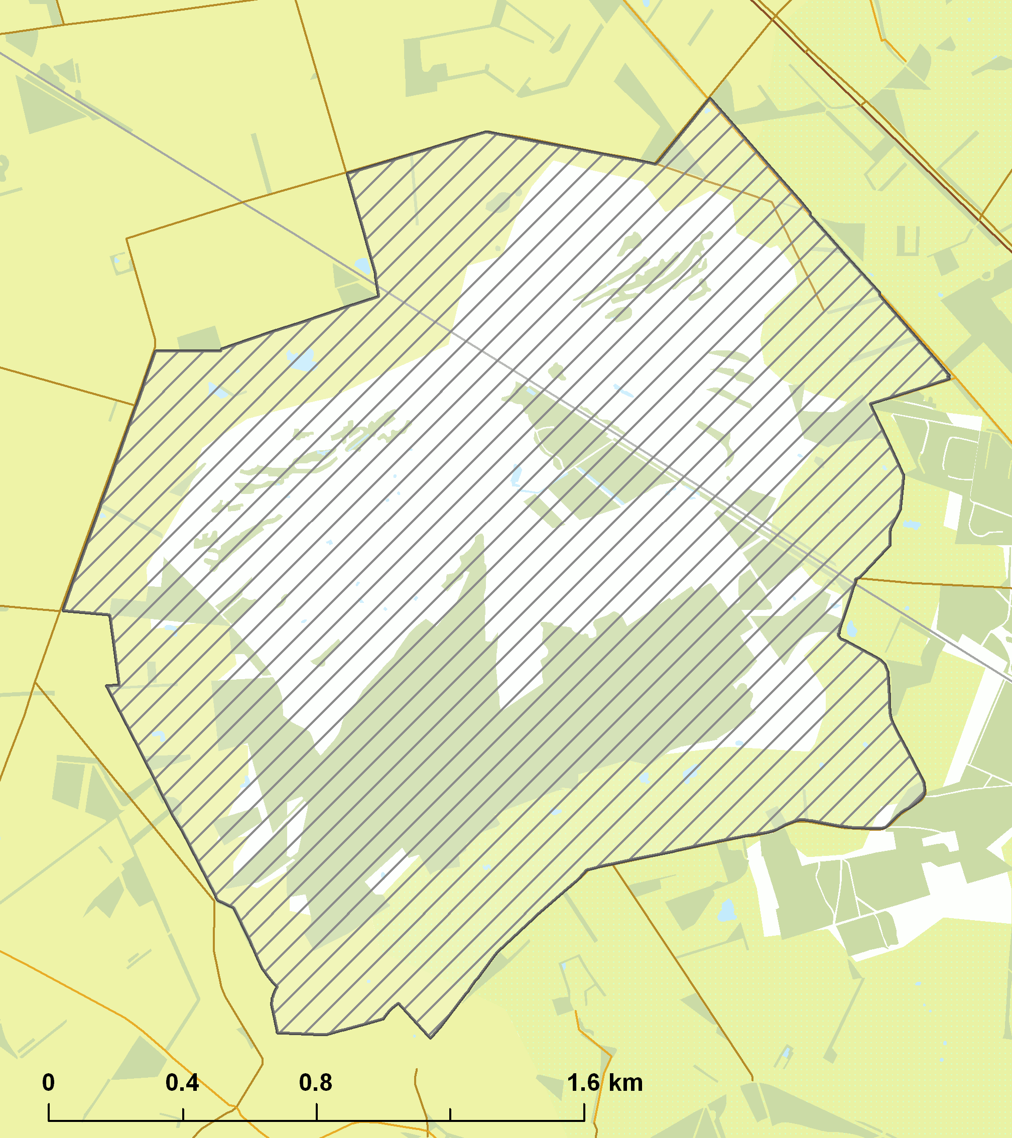 Natura2000 - Korenburgerveen.png